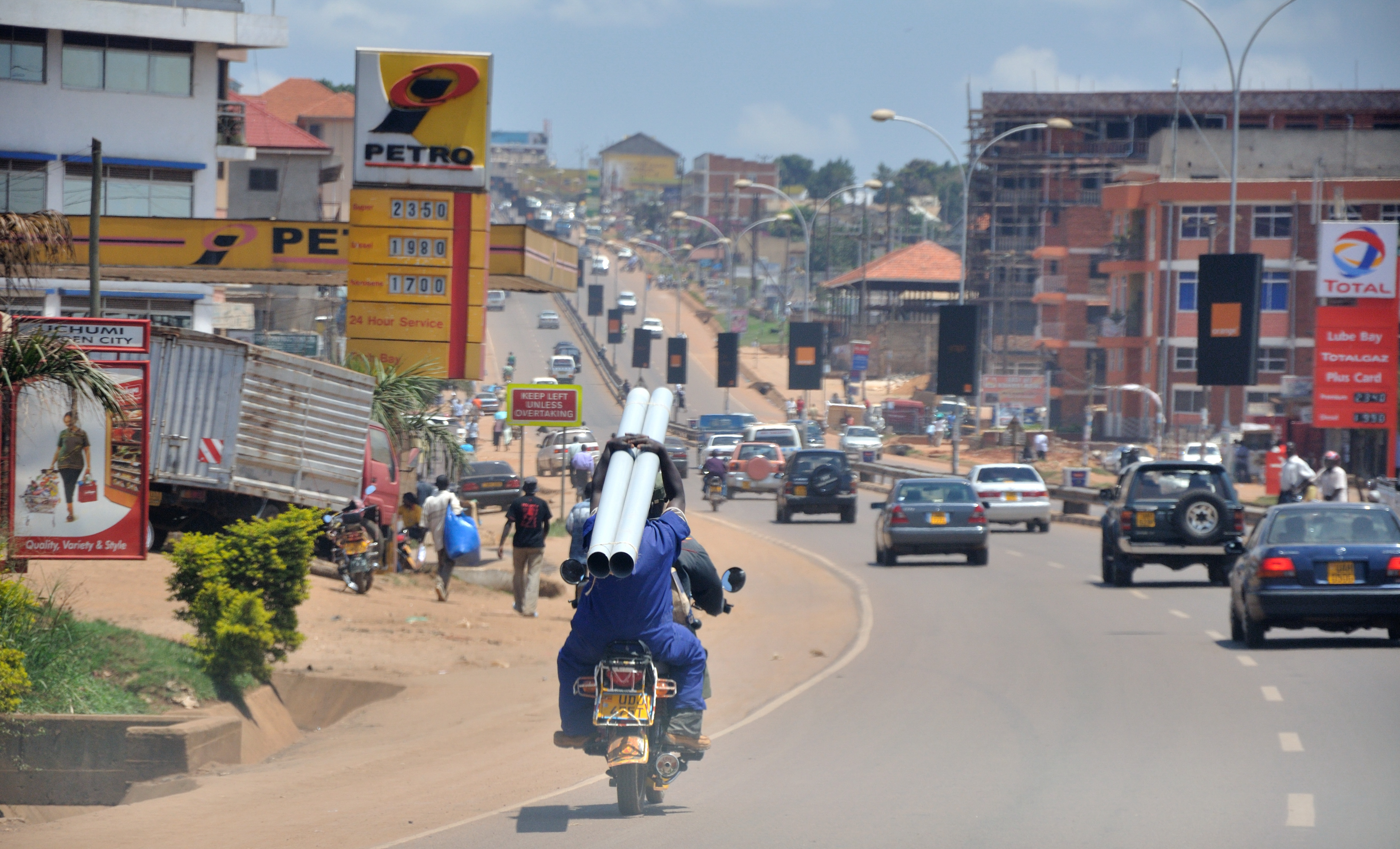 Uganda, Street views between Kampala and Entebbe